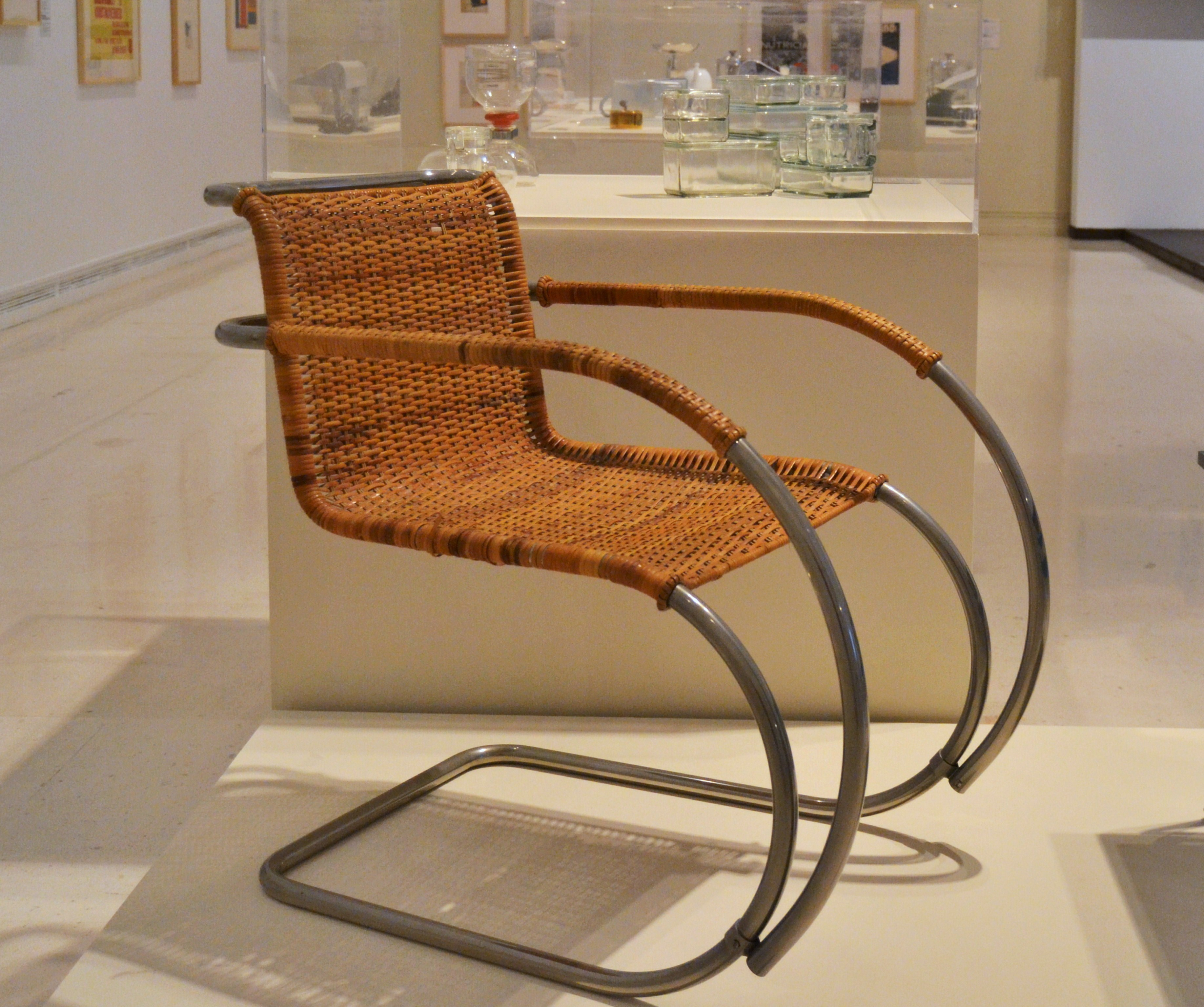 Butaca Weissenhof, TECTA, Alemanaya, Ludwig Mies van der Rohe, 1927. Metall niquelat i medul·la, 81 x 57 x 84 cm. Col·lecció Alfaro Hofmann. Fotografiada durant una exposició a l'IVAM.